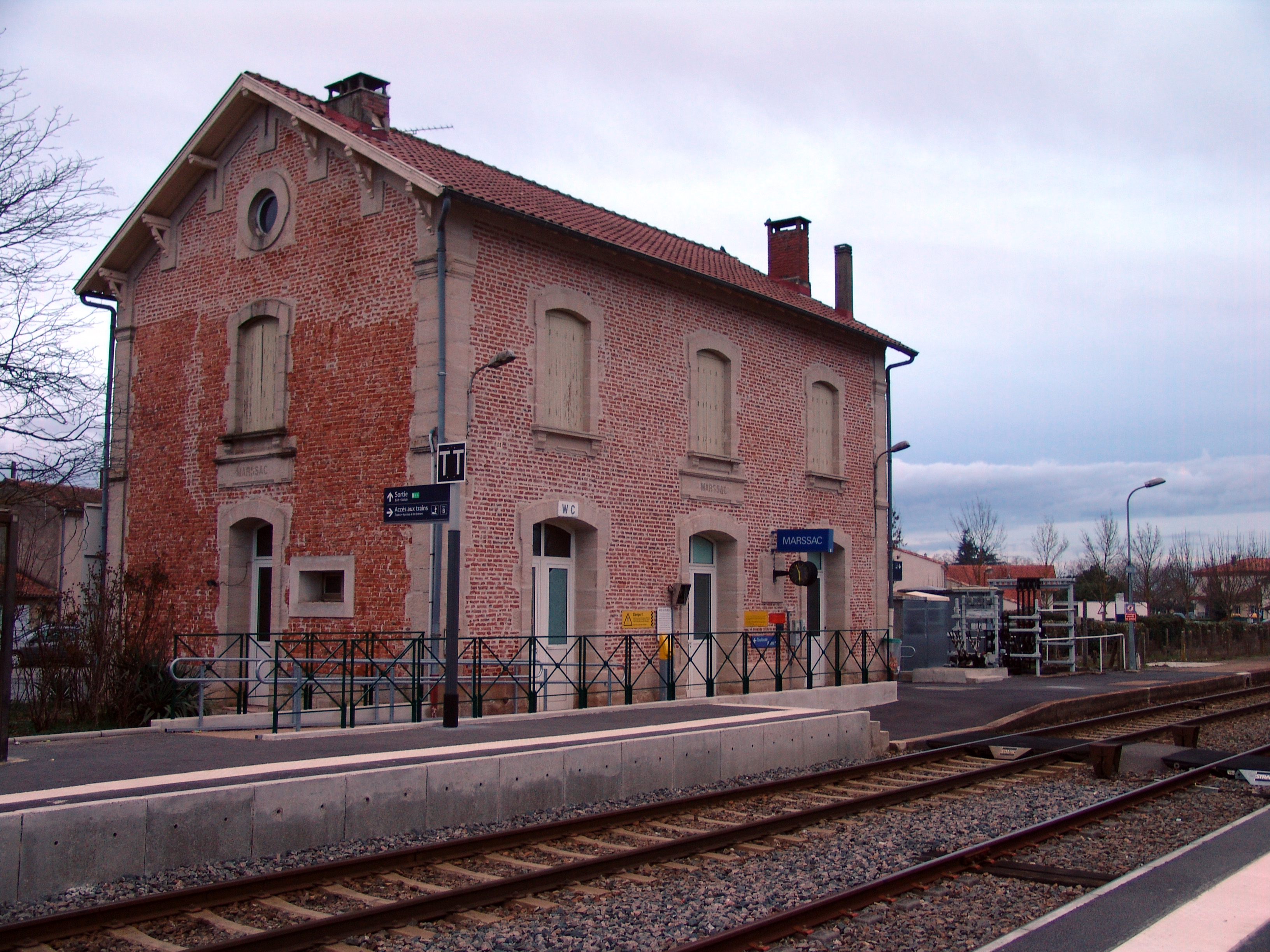 Gare de Marssac sur Tarn coté quais depuis la voie B en direction d'Albi. Par mon.nini